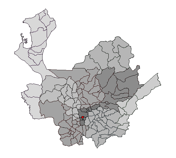 Mapa de localización de Itagüí, Antioquia, Colombia